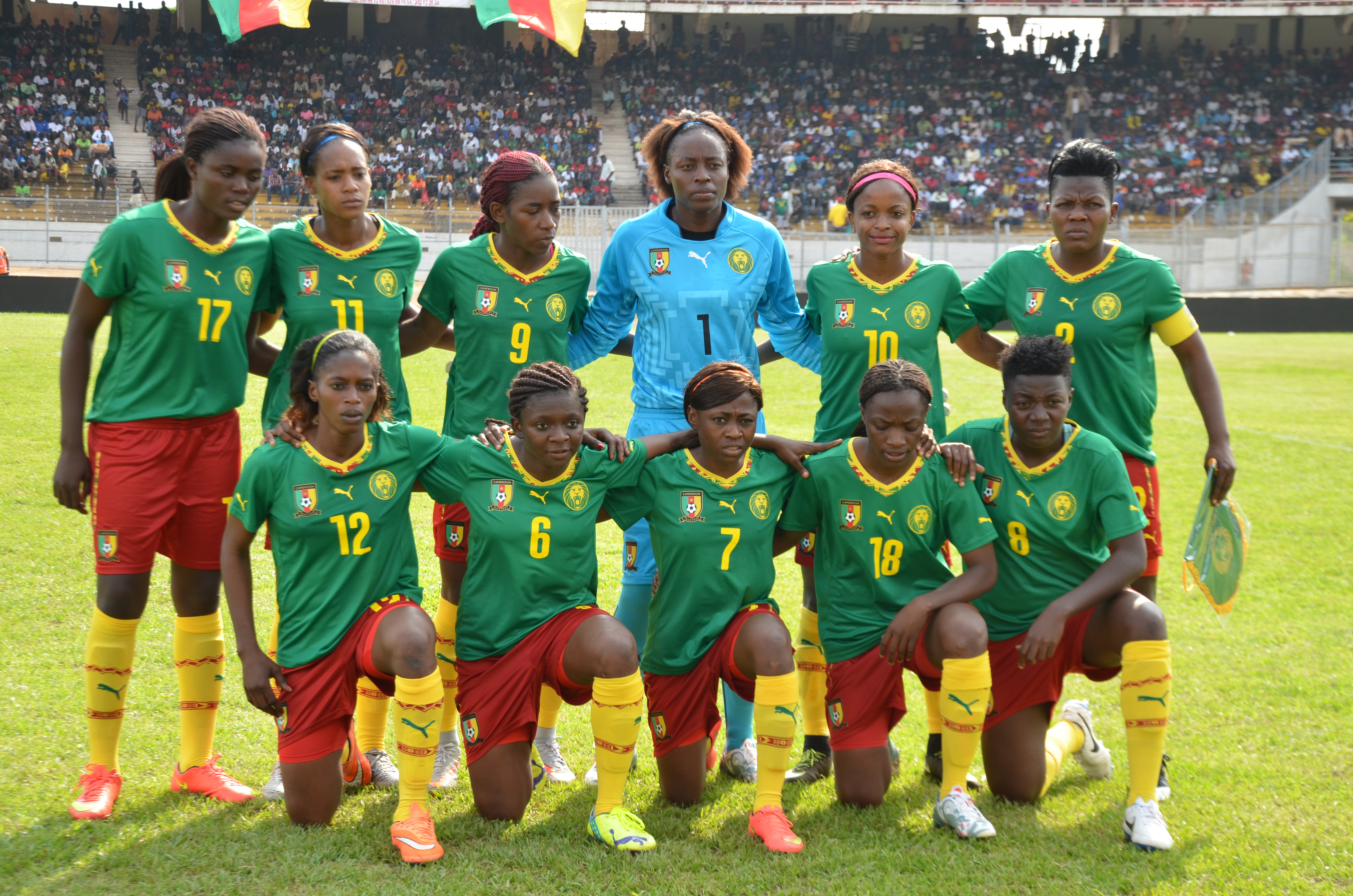 L'équipe de football féminine du Cameroun